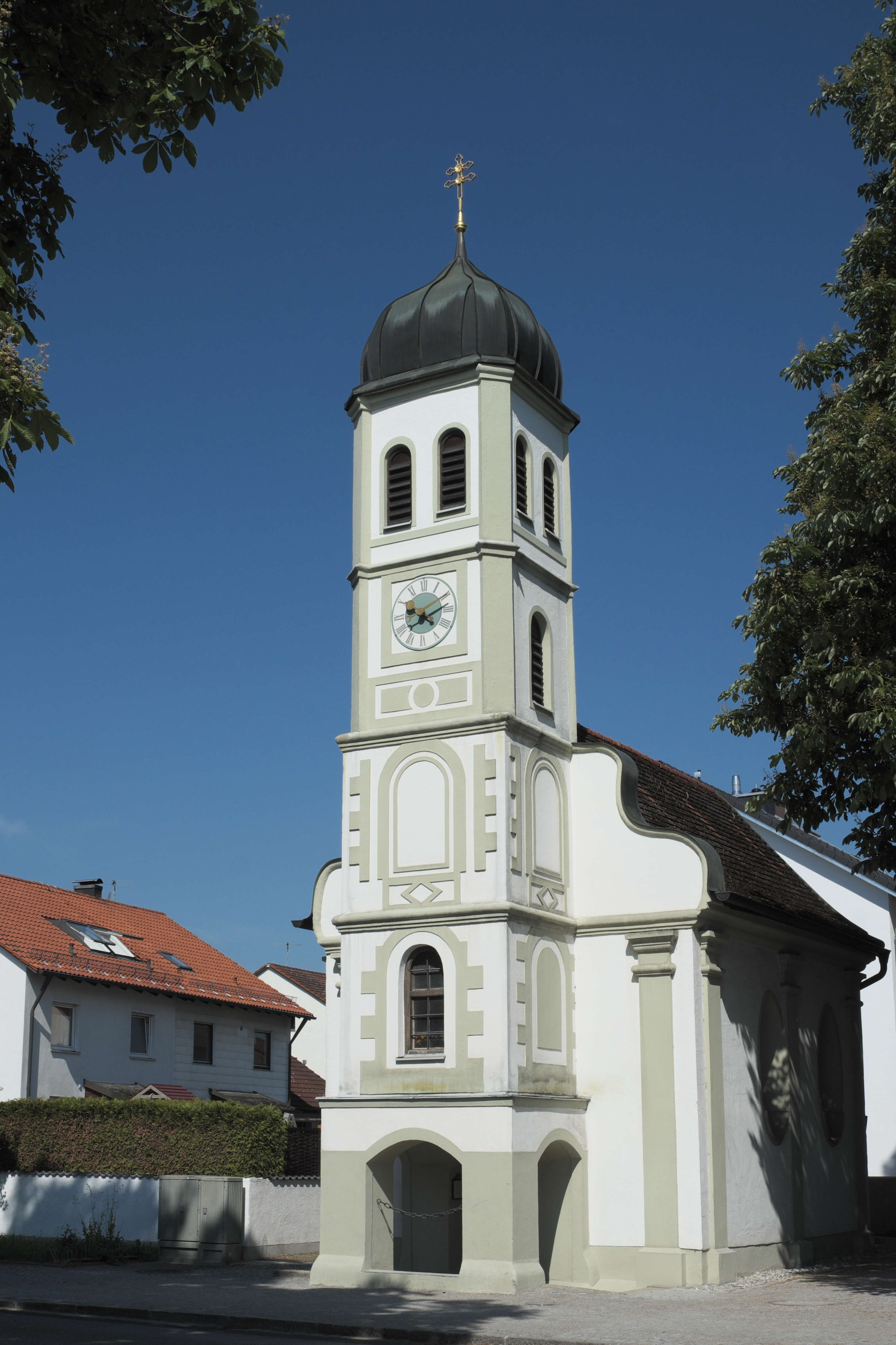 Ehemalige Schlosskapelle St. Johann Nepomuk in Geiselbullach (Olching) im Landkreis Fürstenfeldbruck (Bayern, Deutschland)